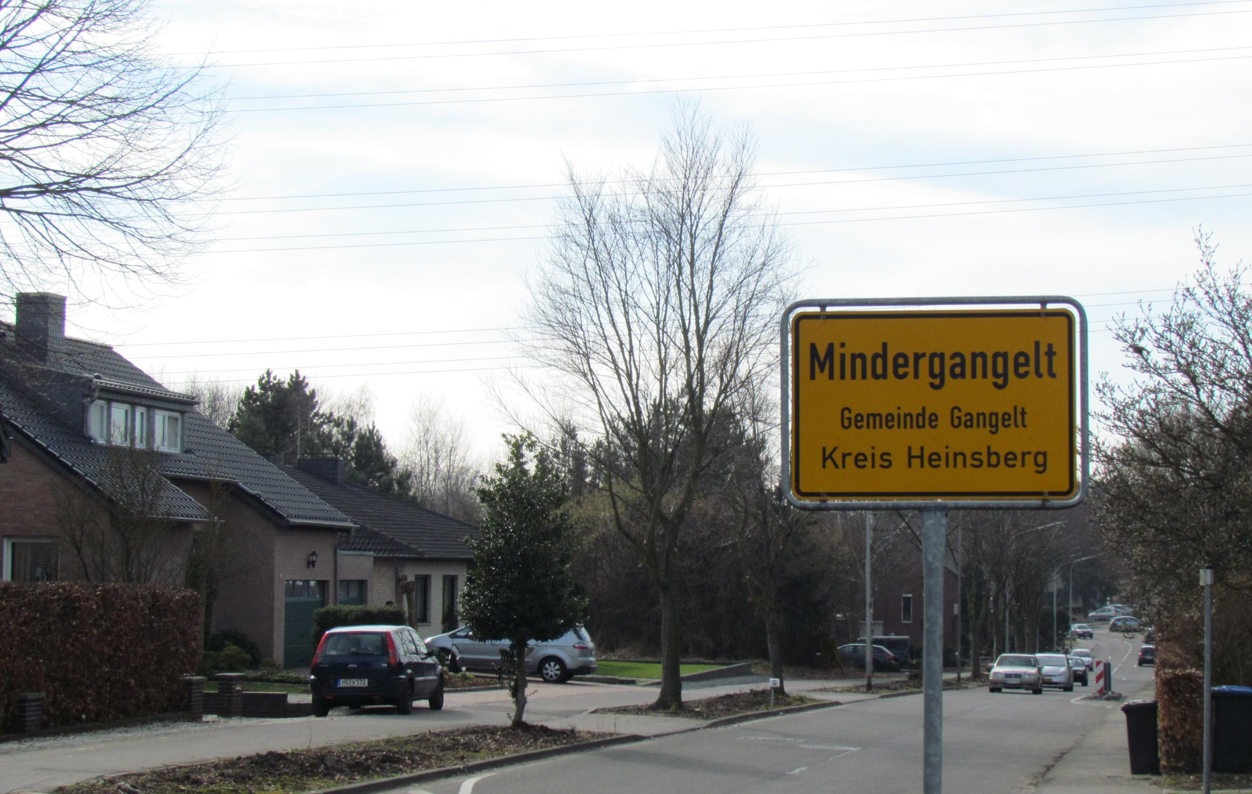 Ortseingang in Mindergangelt